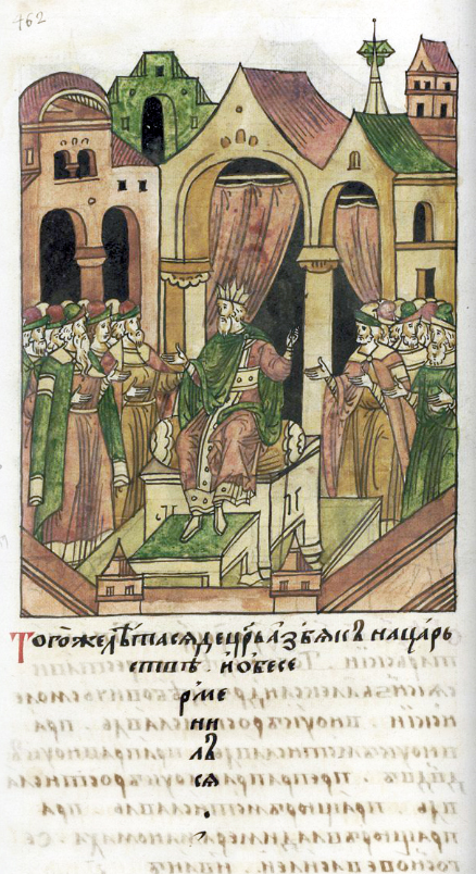 ЛИЦЕВОЙ ЛЕТОПИСНЫЙ СВОД В том же году сел царь Азбяк на царство и обасурманился.